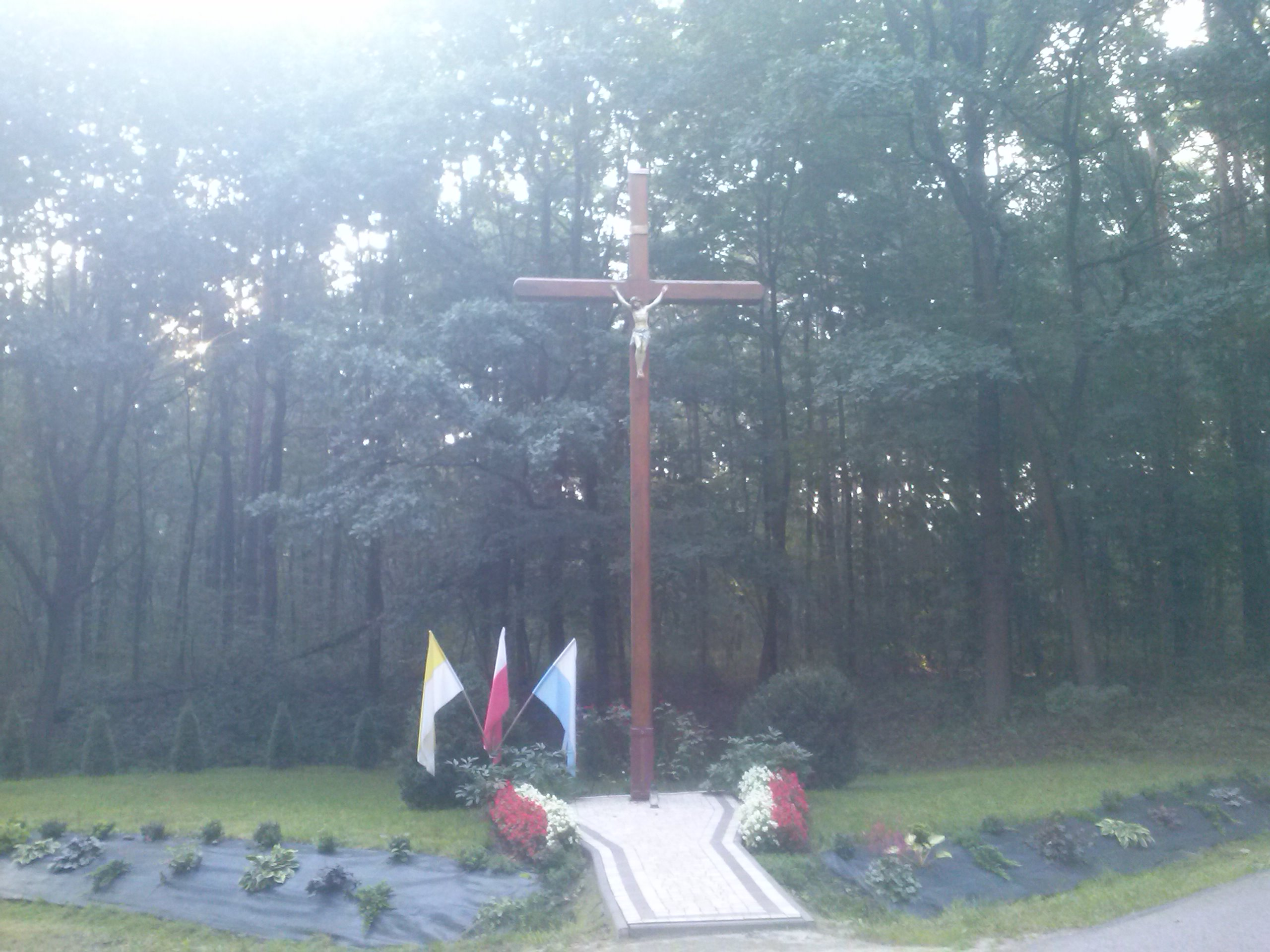 Krzyż w Woli Buchowskiej przy drodze z Florków do Dąbrowy (las Przymiarki)